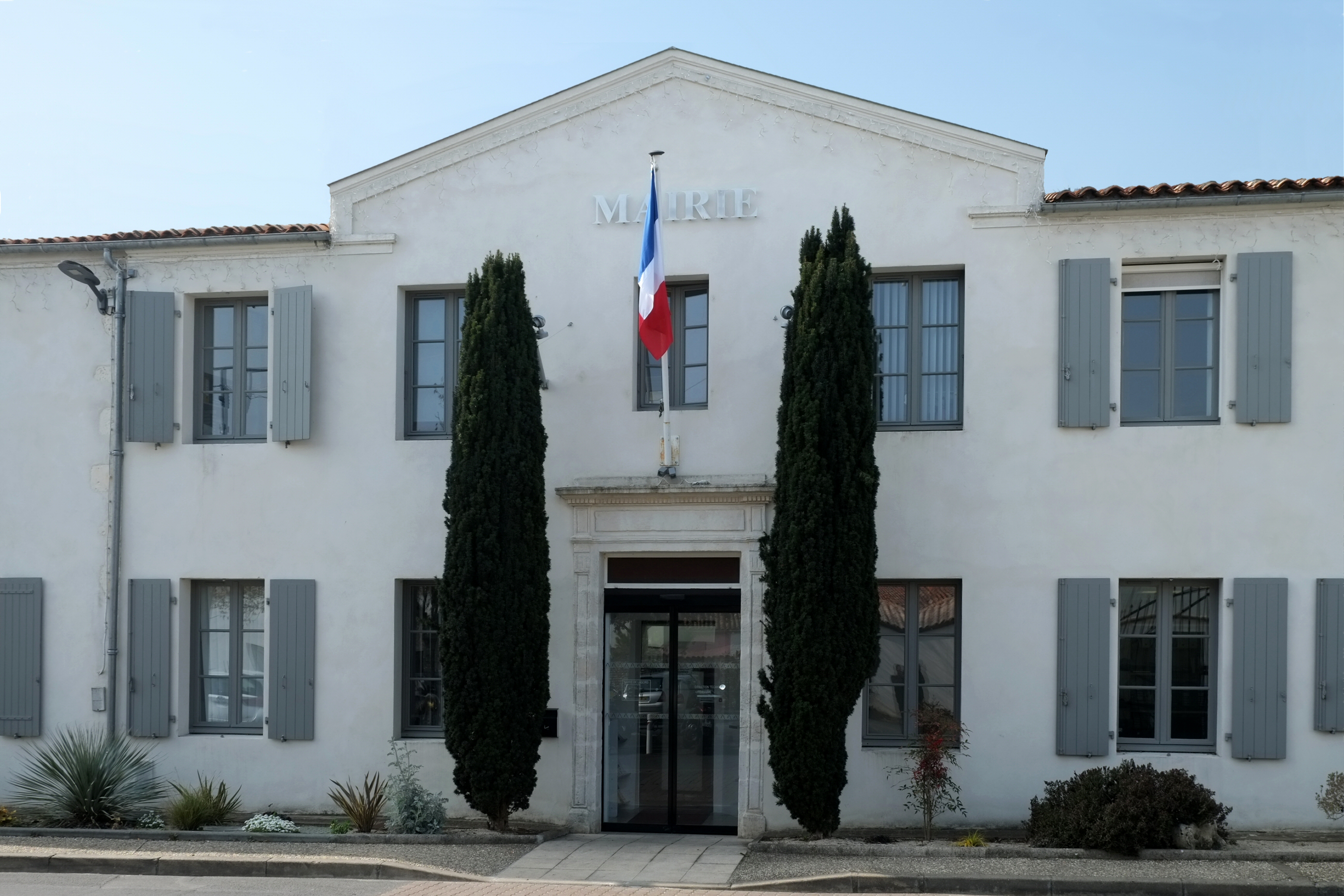 Mairie de Lagord Charente-Maritime France